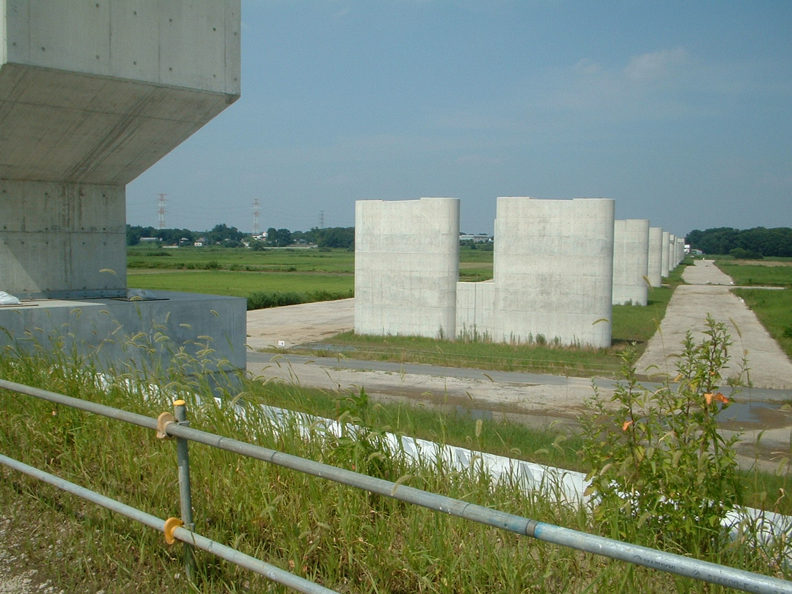 川島から桶川に入るための荒川を越える橋を建設中。